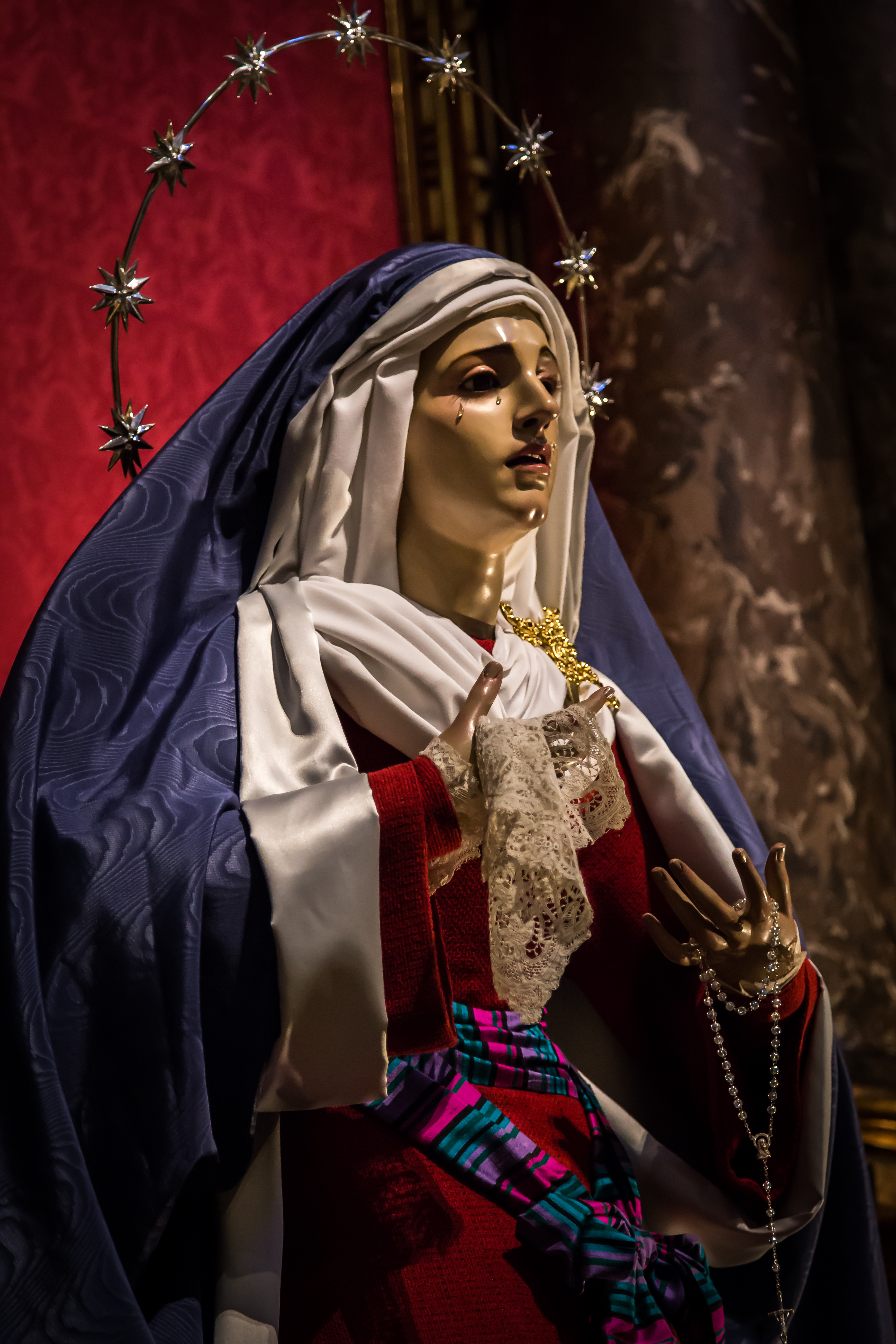 Capilla de las sagradas imágenes de la Hermandad Sacramental y Cofradía de Nazarenos de "Los estudiantes". Basílica Pontificia de San Miguel, Madrid.